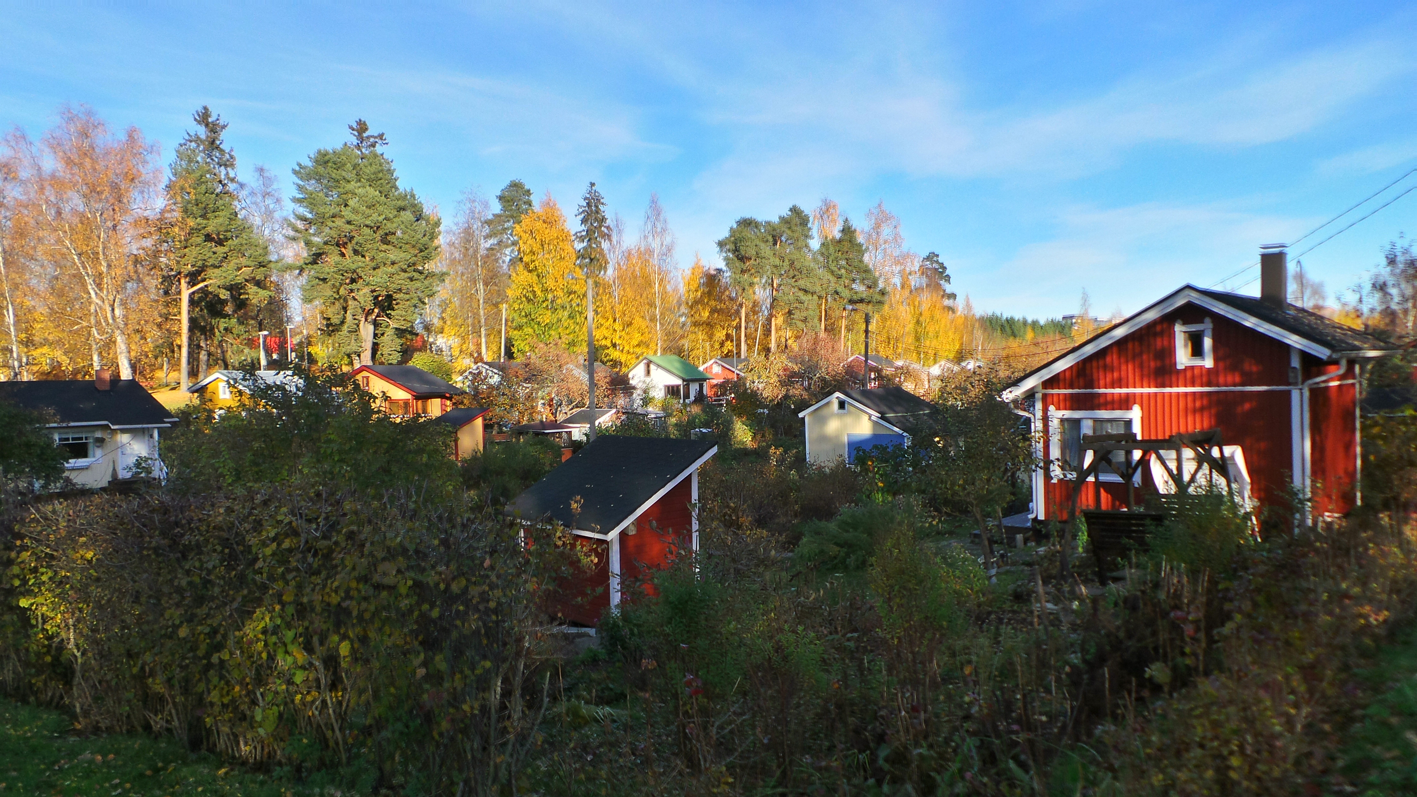 Litukan siirtolapuutarha